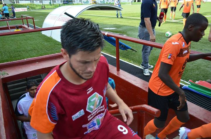 Pablo Olivera antes de jugar contra la guaira